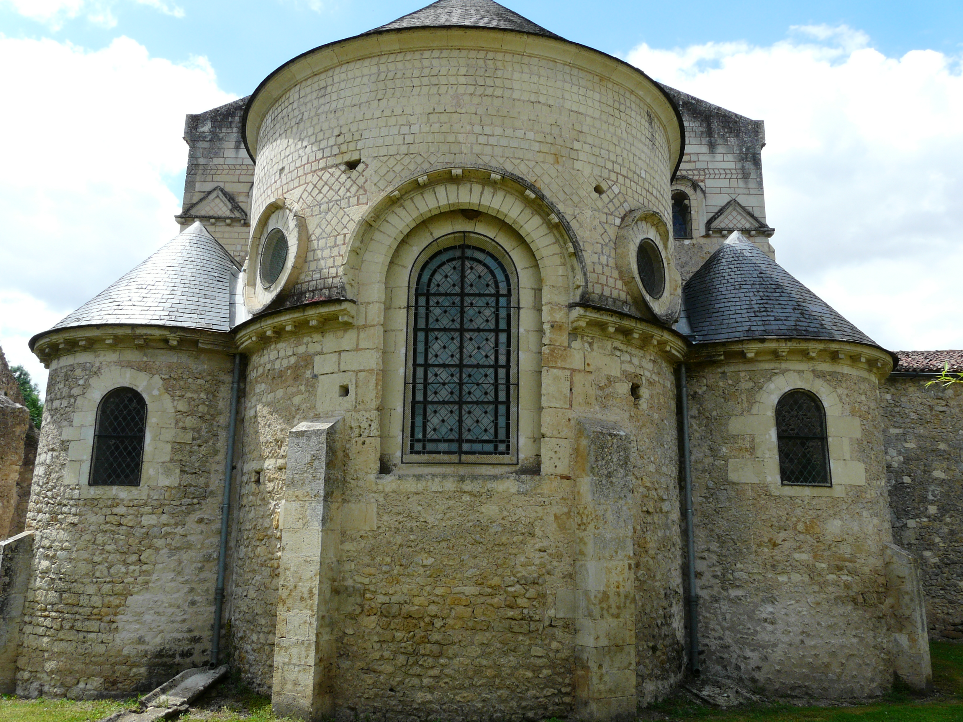 L'abside flanquée des deux absidioles, chevet de l'église, Saint-Généroux, Deux-Sèvres, France